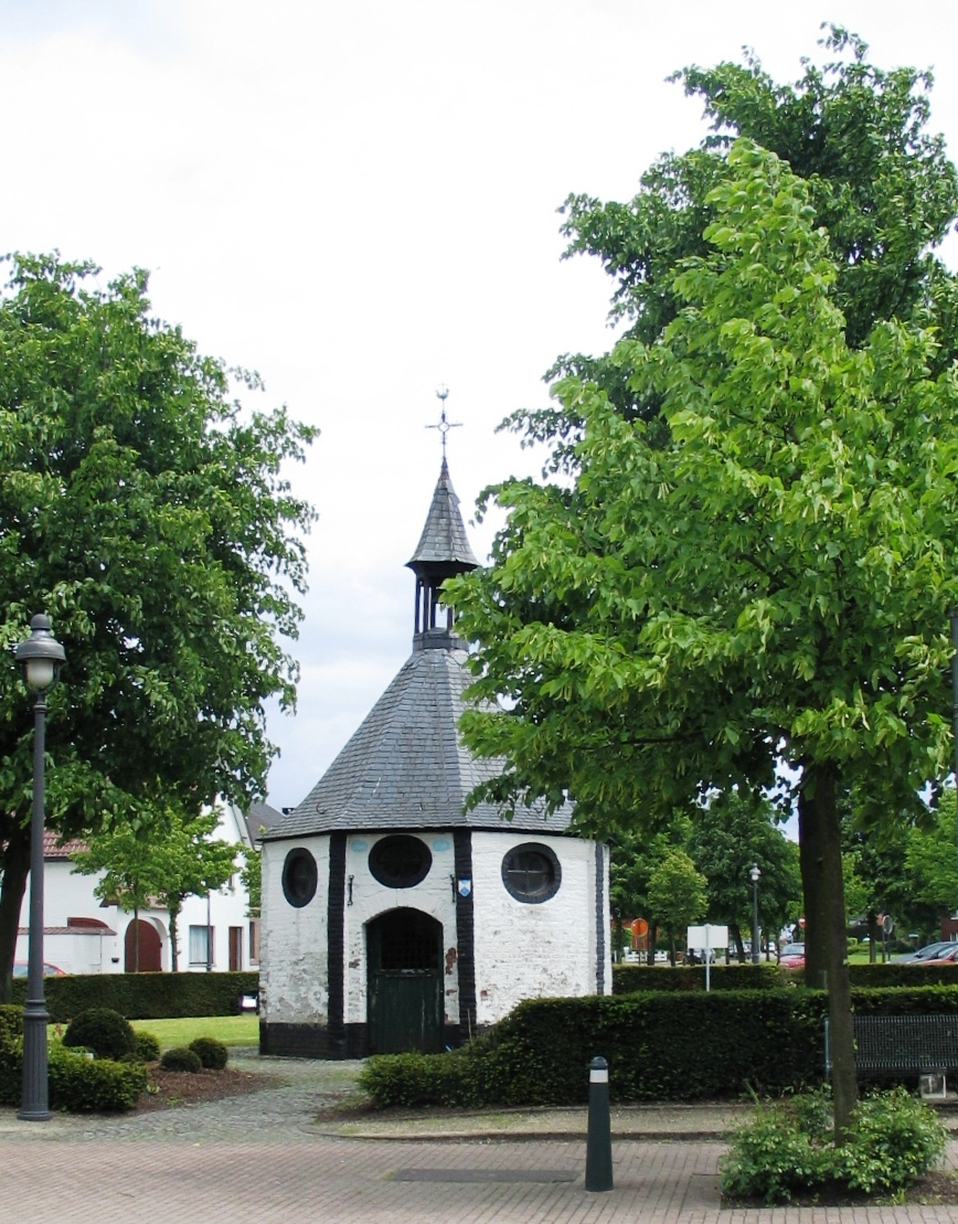 eind 18e eeuwse kapel in Zonhoven - eigen foto